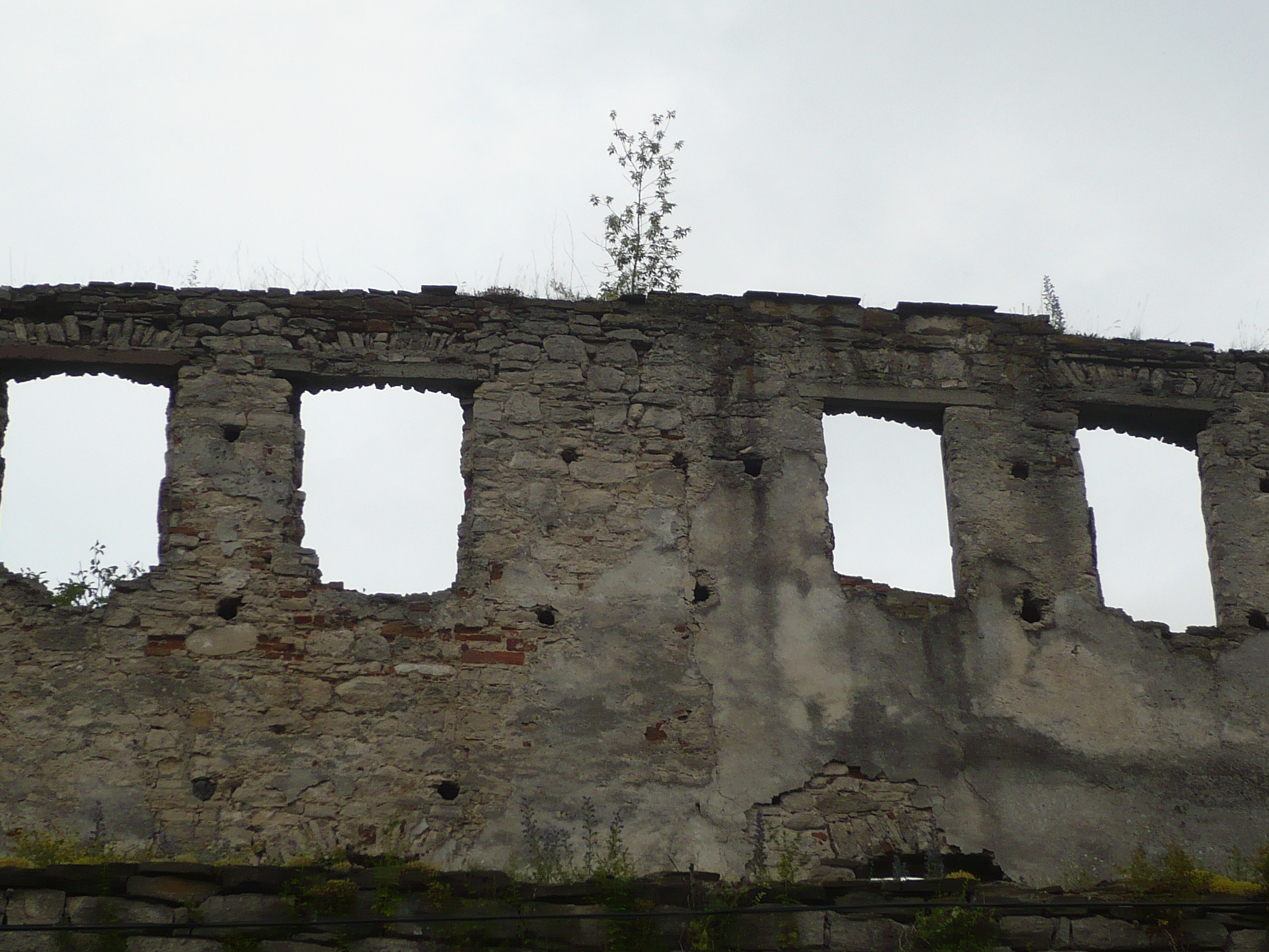 Czortków. Zamek